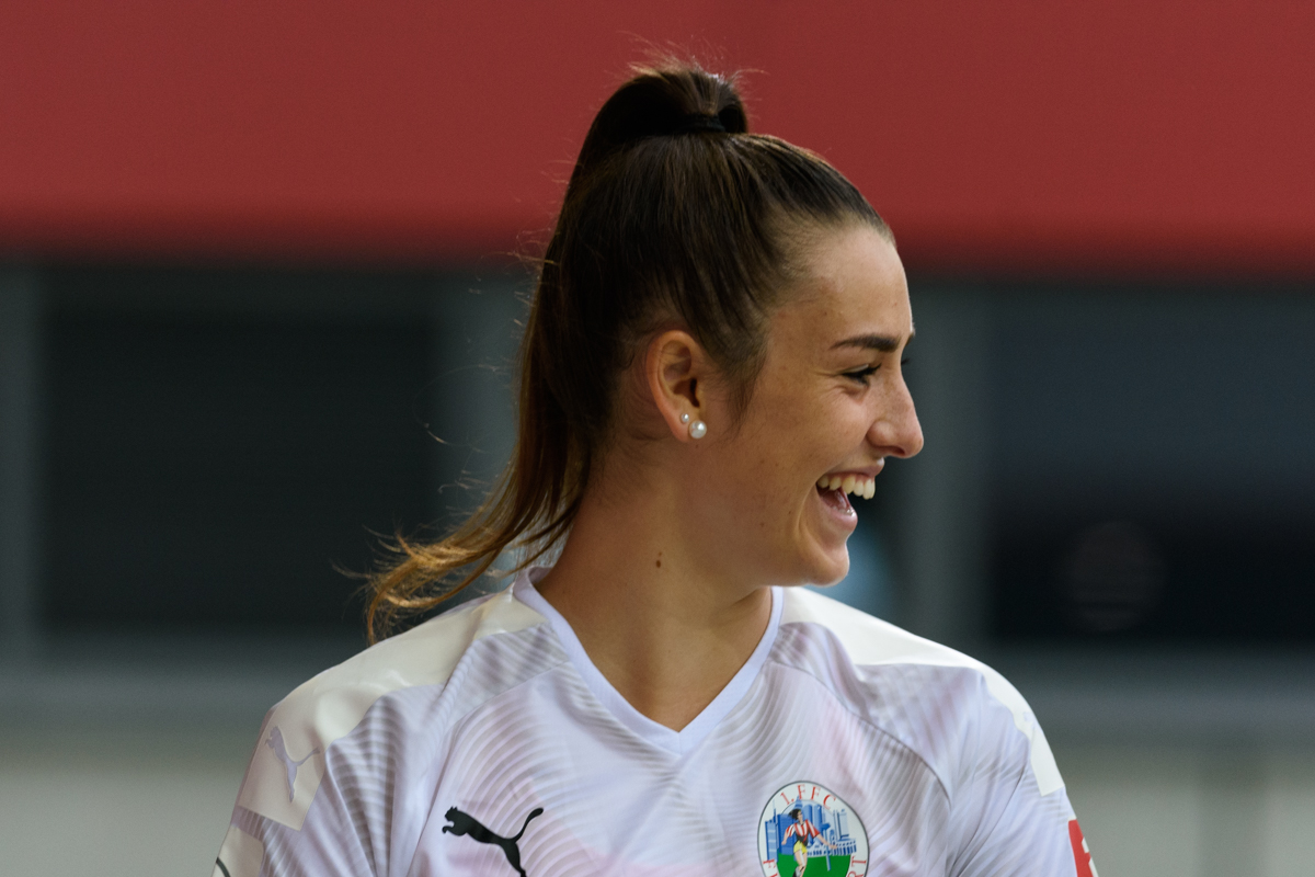 Selina Ostermeier 2019